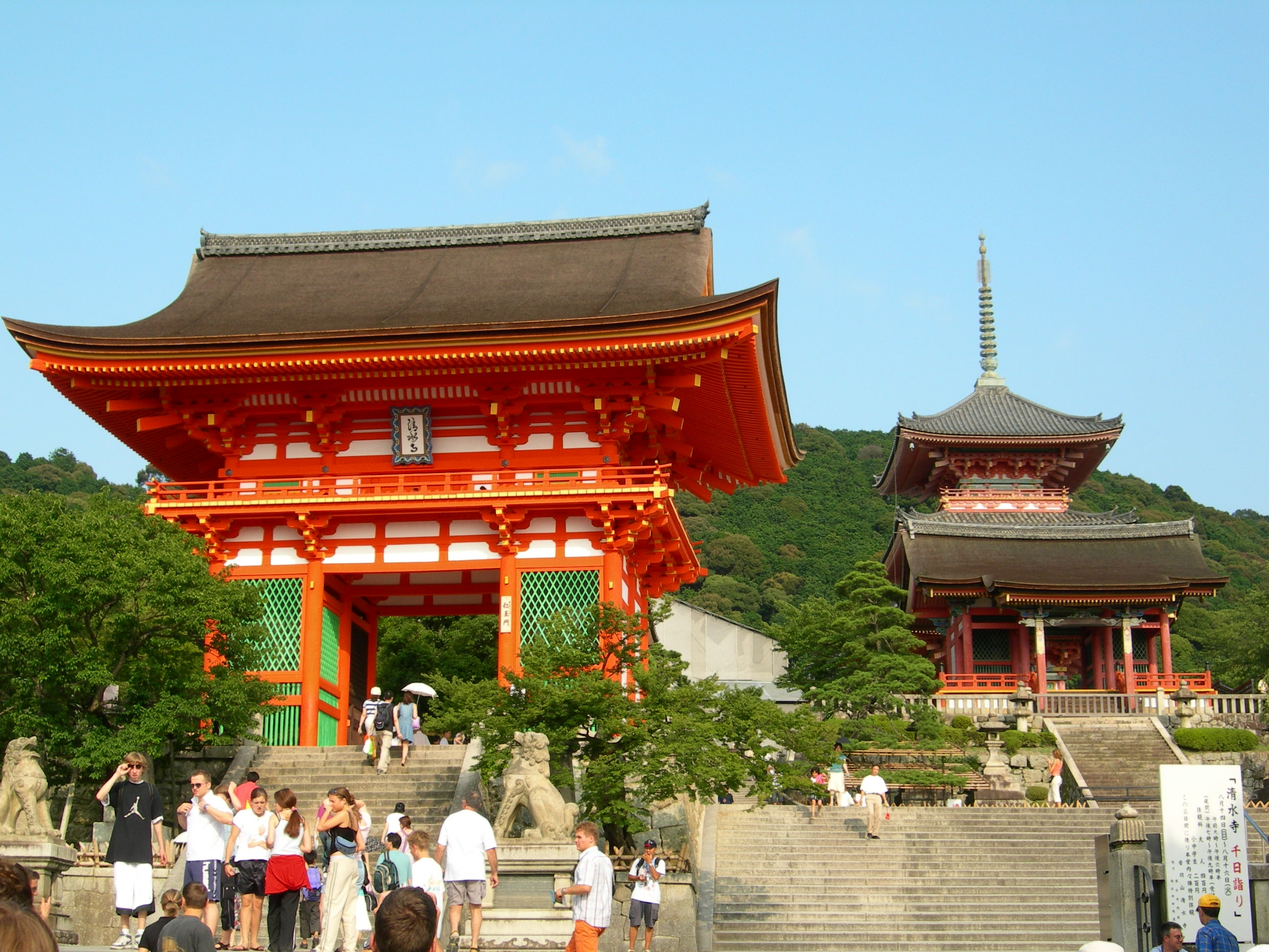 Gebäude am Eingang des Kiyomizu Tempels in Kyoto (Japan)